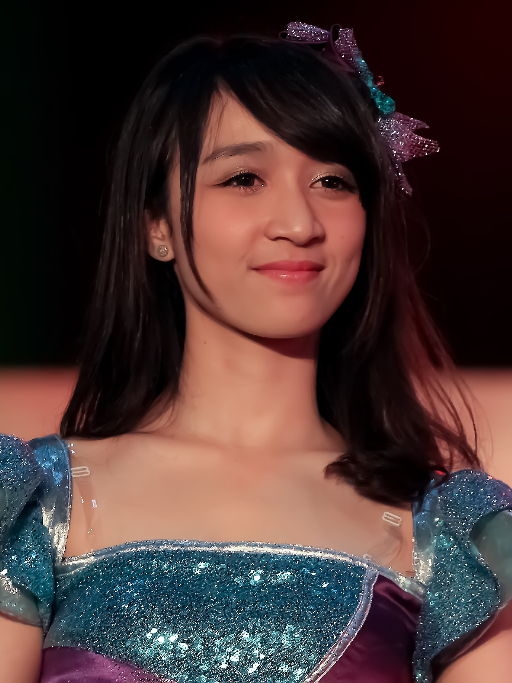 Ayana Shahab pada JKT48 Halloween Night Handshake Festival, 2015.